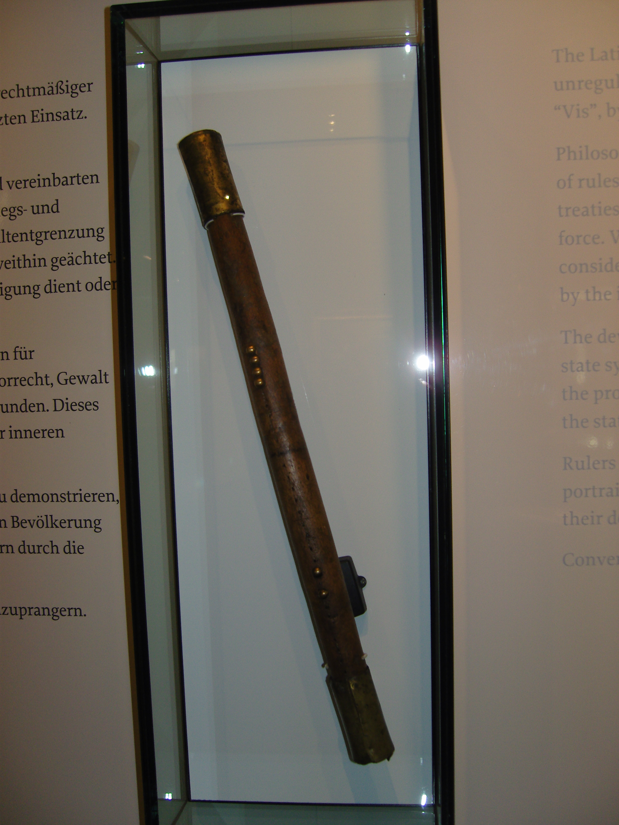 Kommandostab des Freiherrn Defflinger, Feldherr bei Friedrich Wilhelm von Brandenburg, ausgestellt im Militärhistorischen Museum in Dresden